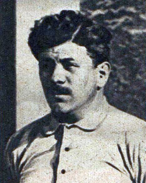 Jean Sebedio en 1920.